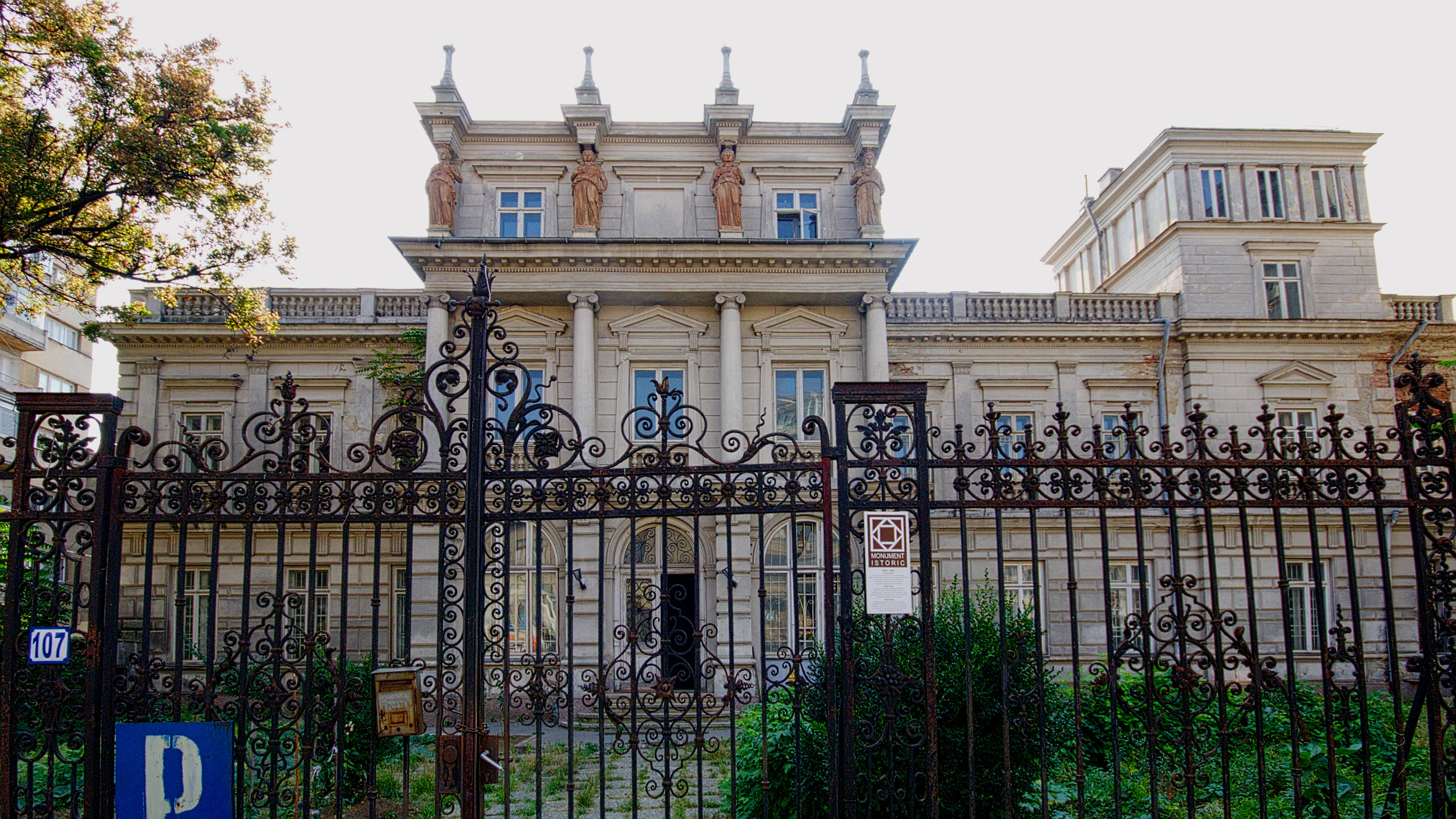 Palatul Știrbei, Calea Victoriei 107, Constantin Budișteanu 7, Banului 2